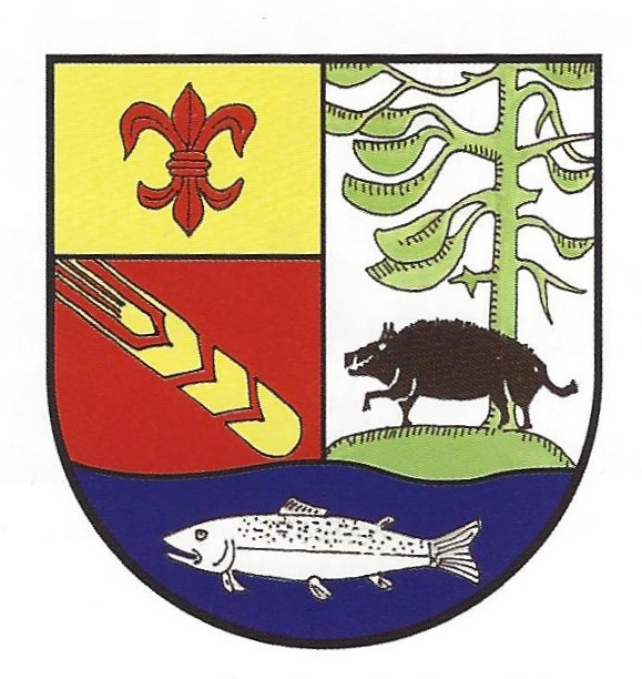 Wappen des Dorfes Dobbin bei Krakow am See